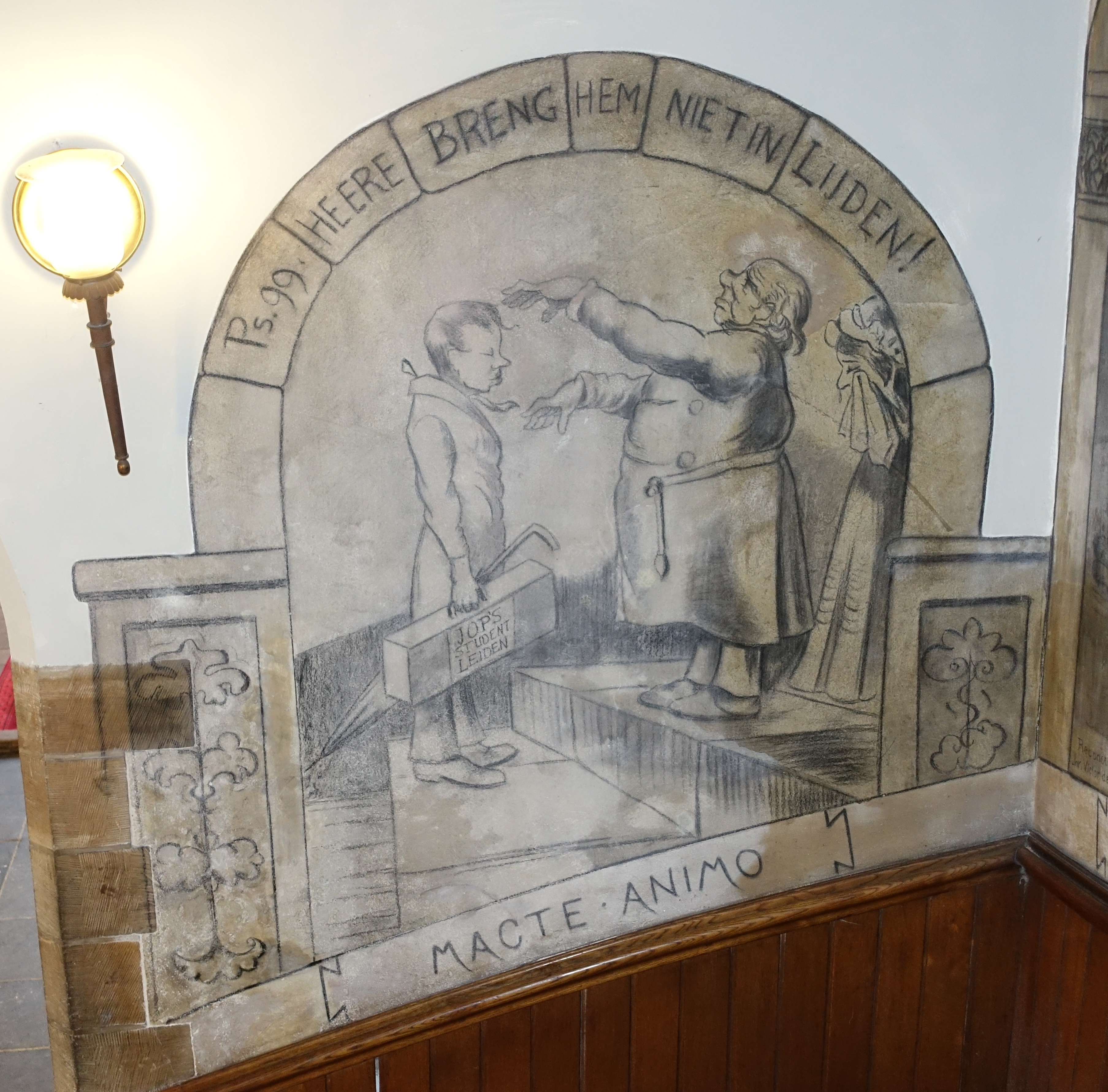 Tekening van Louis Raemaekers (1869-1956), reproductie op dezelfde plek van een tekening van Victor de Stuers (1841-1916), onderaan de trap van het Academiegebouw in Leiden. De reproductie werd in augustus 1919 gemaakt in het kader van een duurzame restauratie. De Stuers had bij leven voor deze taak Raemaekers uitgekozen. De originele tekening dateert uit 1865. Te zien is een student die afscheid neemt van zijn ouders om aan de universteit van Leiden te gaan studeren. Zijn vader zegent hem en zijn moeder huilt van verdriet. De student stelt Victor de Stuers zelf voor, herkenbaar aan zijn weerspannige lok haren, en de andere twee figuren zijn z'n eigen ouders Het 'Lijden' met hoofdletter in de psalmtekst staat voor de stad Leiden.